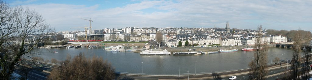 Composition de 4 photos du quartier de la Doutre à Angers, Maine-et-Loire, France.